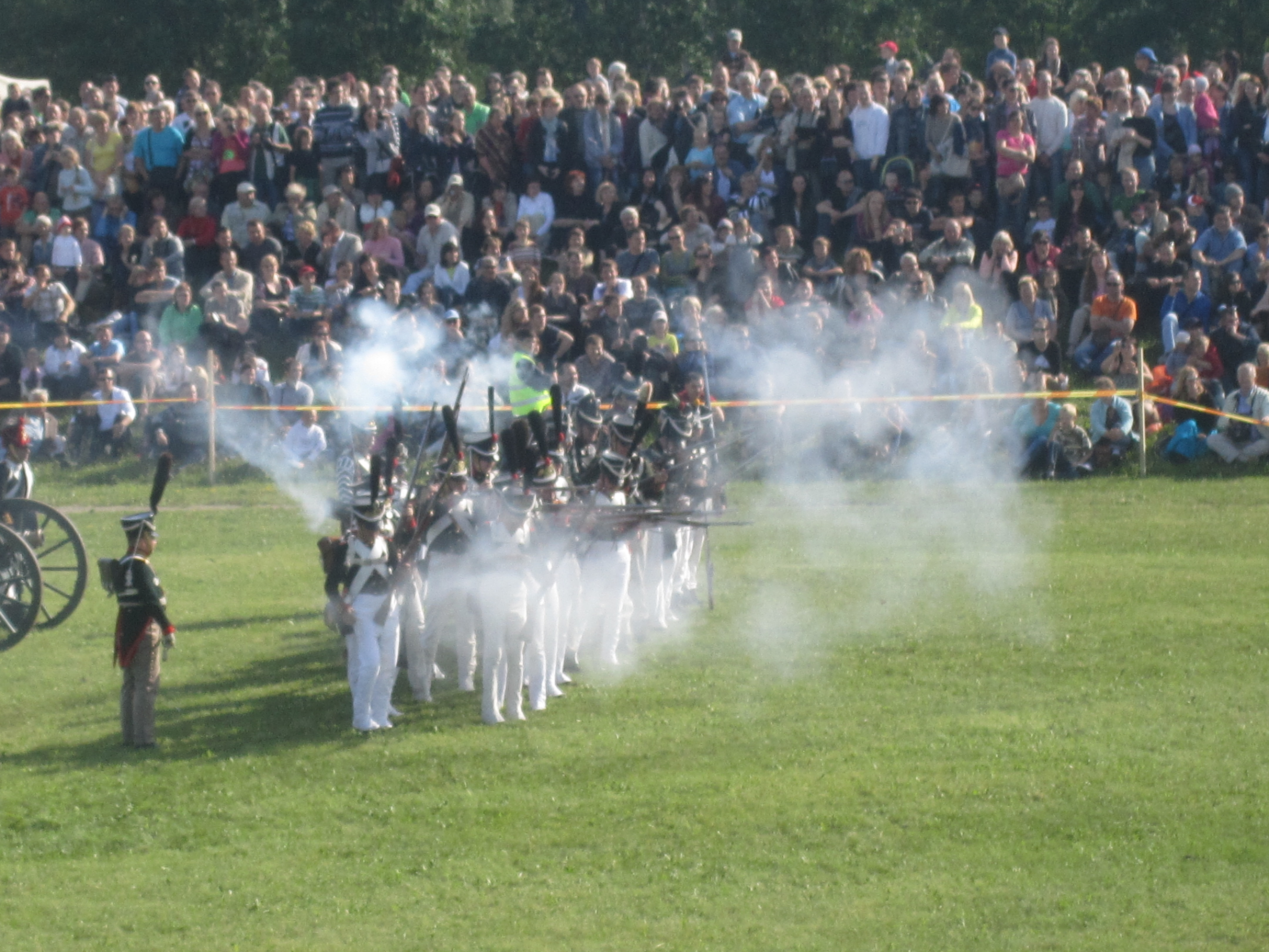 Napaleono mūšio atkūrimas